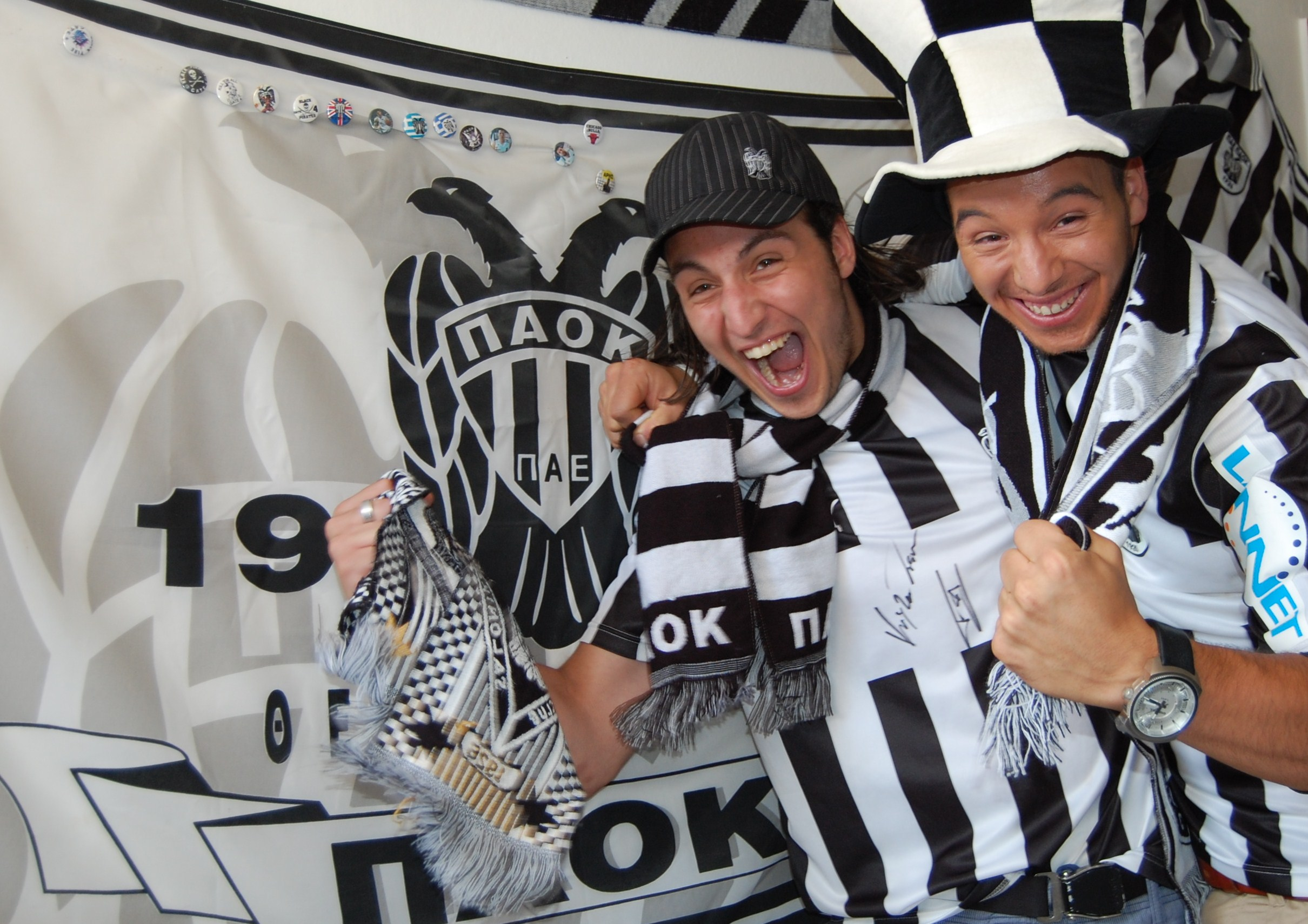 Zwei Fans des griechischen Fußballvereins PAOK Thessaloniki vor Vereinsfahne